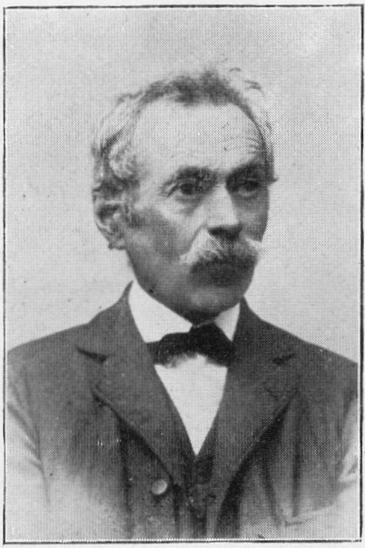 P-ro Daniele Marignoni L. K., Crema, malnova propagandisto.